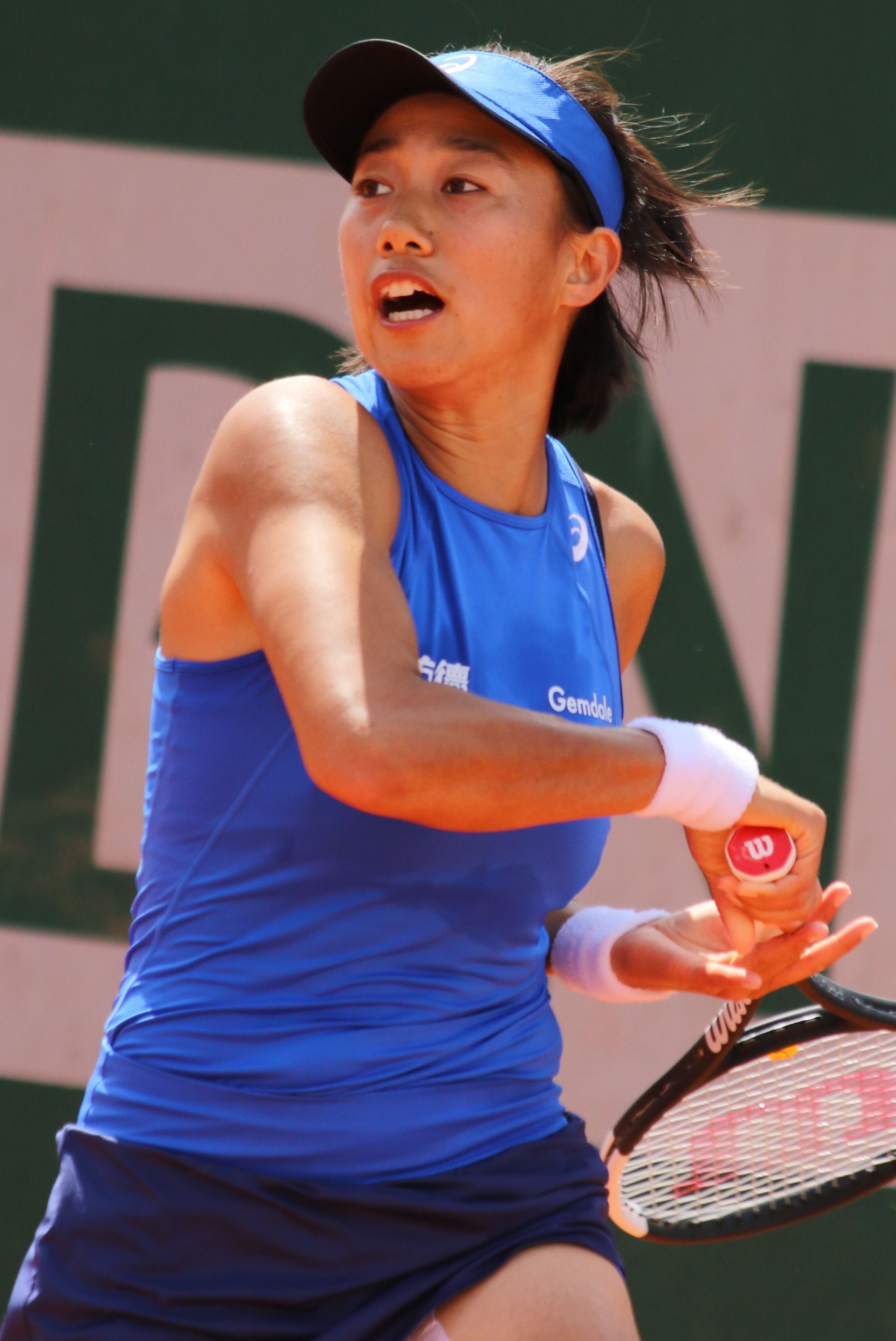 Zhang RG19 (16)